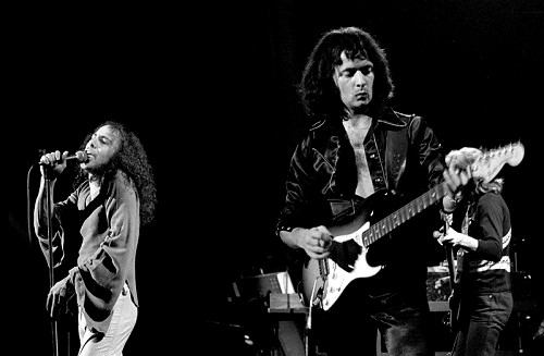 Ronnie James Dio and Ritchie Blackmore in Rainbow, Chateau Neuf, Oslo, Norway